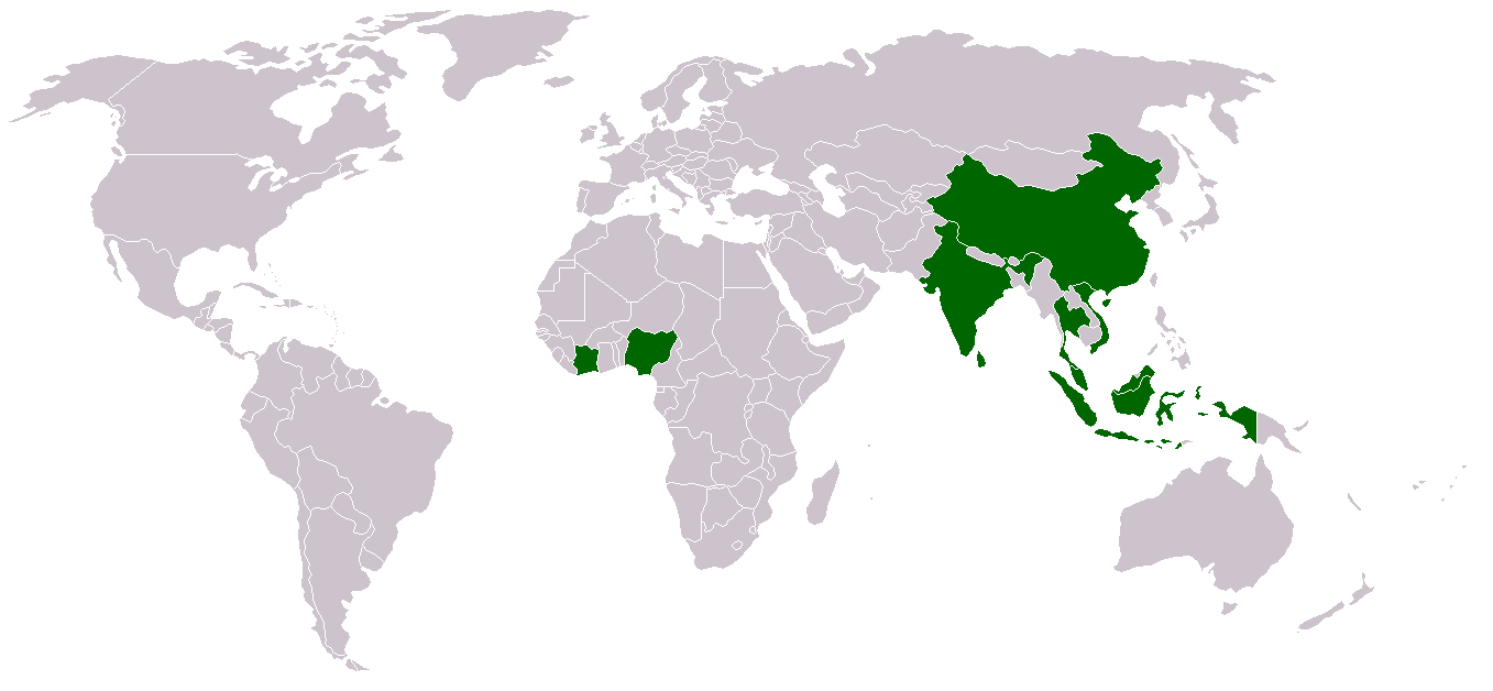 Karte der Staaten mit der weltweit größten Naturkautschukproduktion.